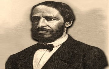 General Ignacio de la Llave